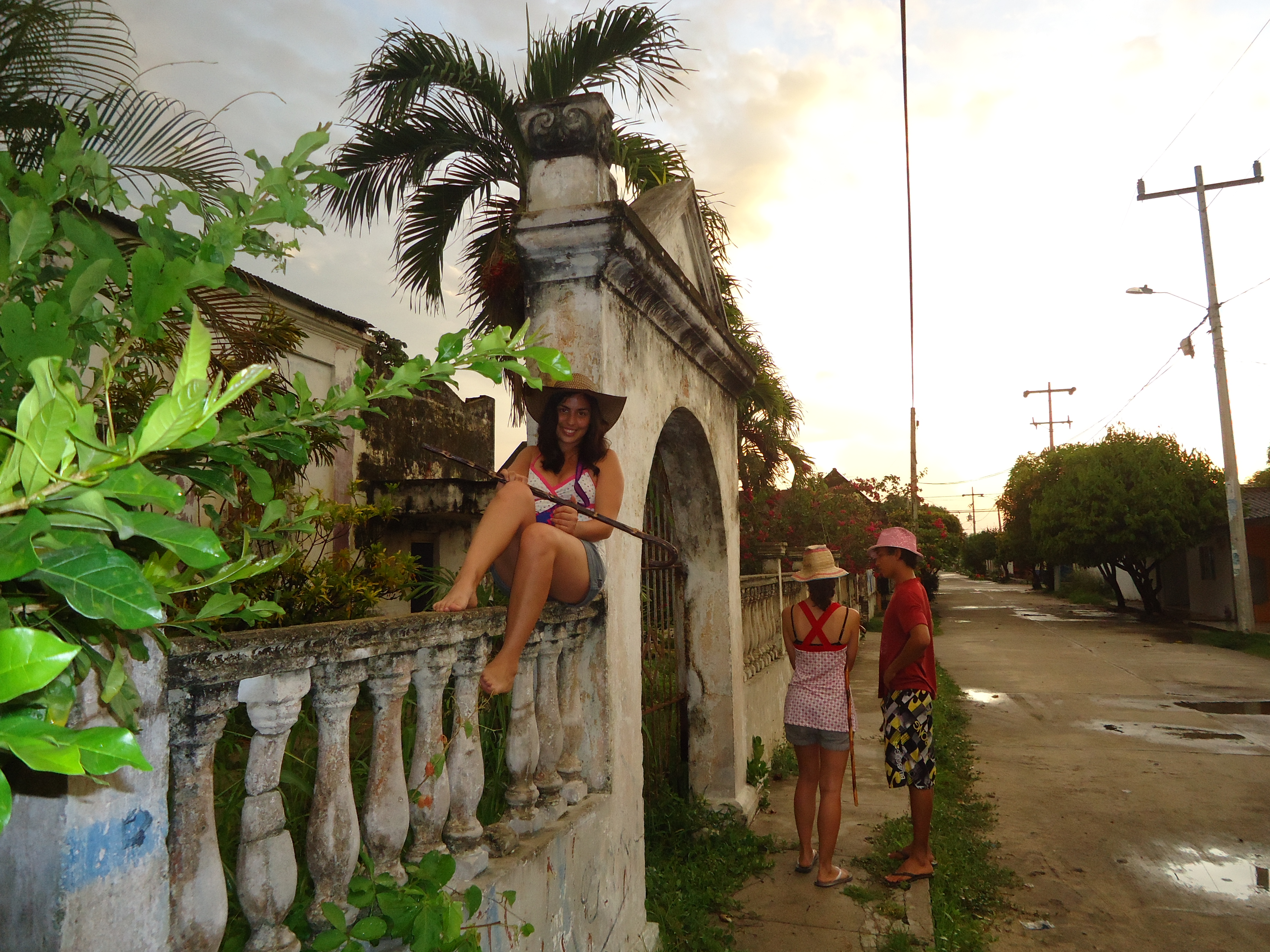 La logia masonica en Aracataca